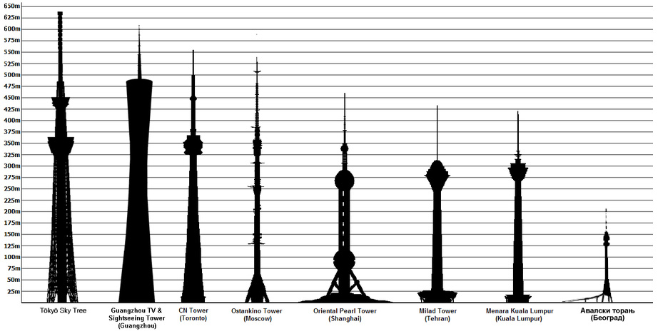 Авалски торањ у поређењу са највишим светским ТВ торњевима, дорађен фајл 800px-Tallest_towers_in_the_world.PNG (викиостава)